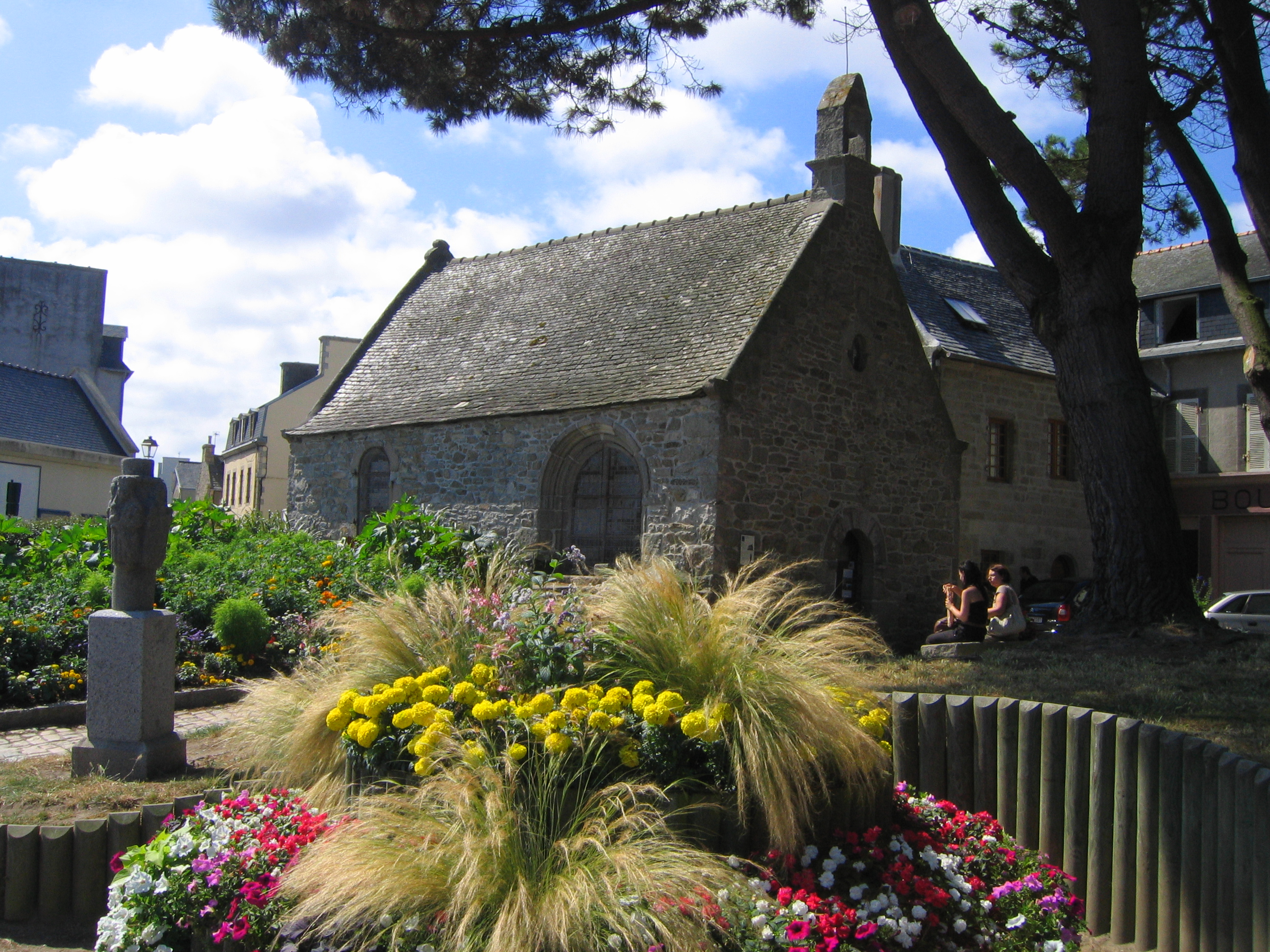 La chapelle Saint-Anne à Roscoff.